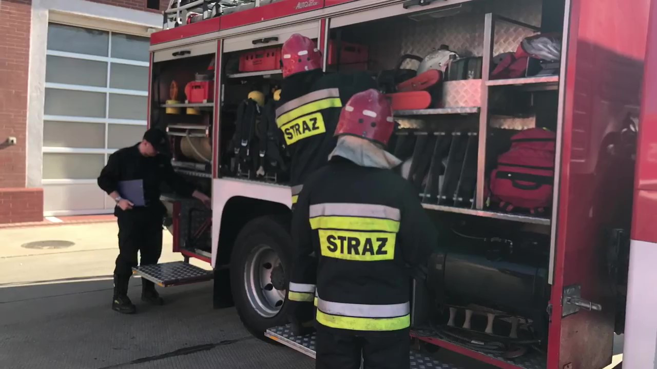 Inspekcja gotowości operacyjnej JRG Prudnik.